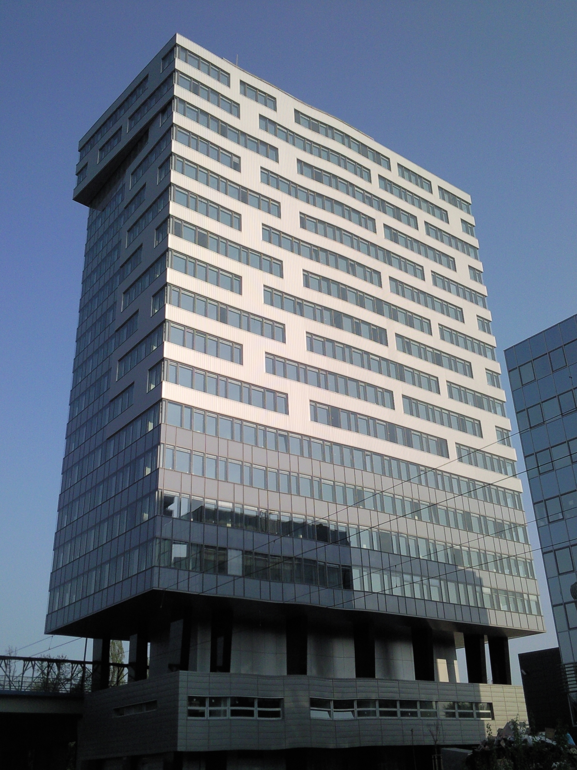 Tatra City, Petržalka, Bratislava